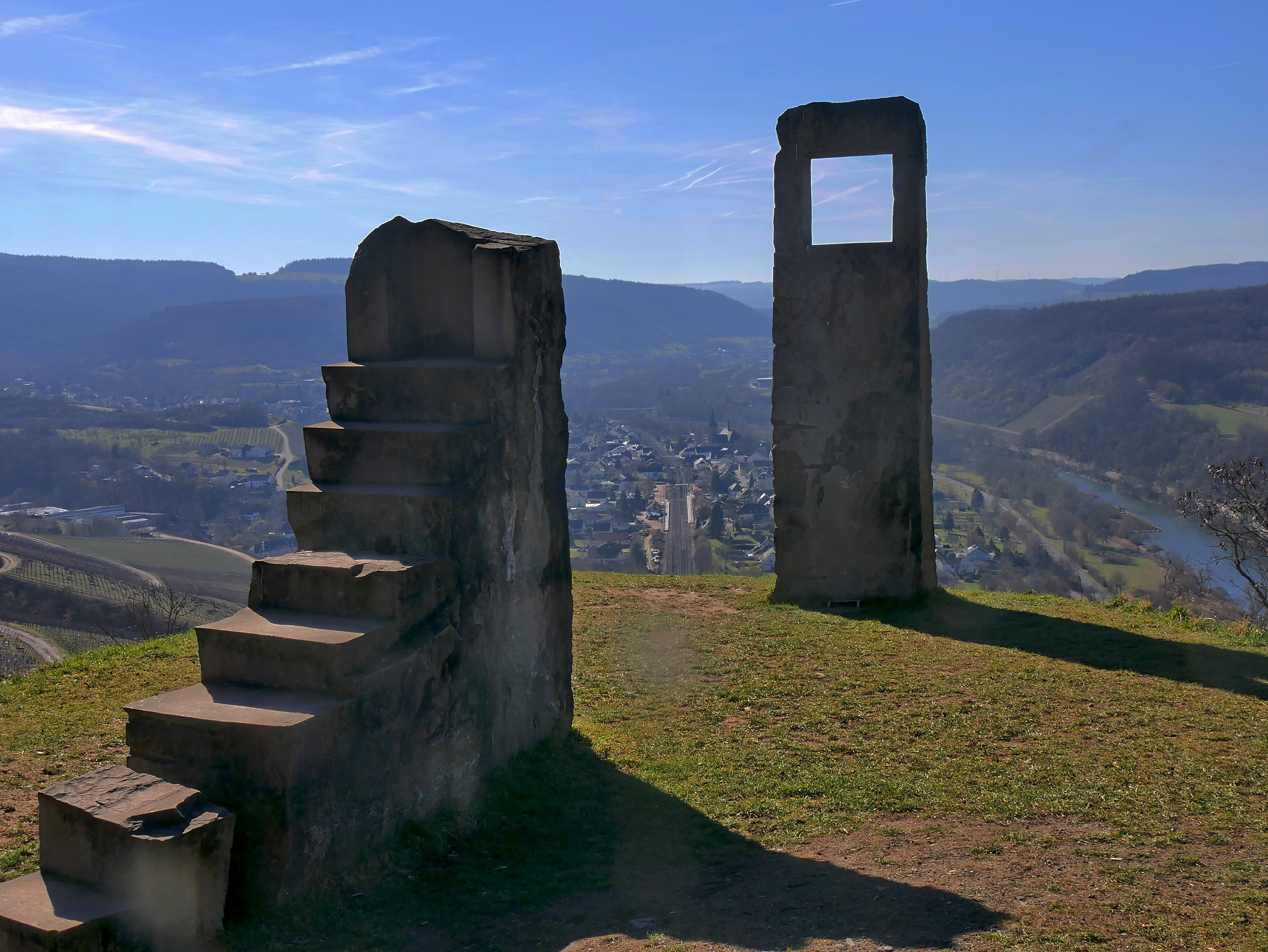 "Passagio Animato" von Maria Claudia Farina; Lage: auf dem Galgenberg über Wiltingen an der Saar. Im Hintergrund sind Bahn, Kirche und Häuser von Wiltingen zu sehen.